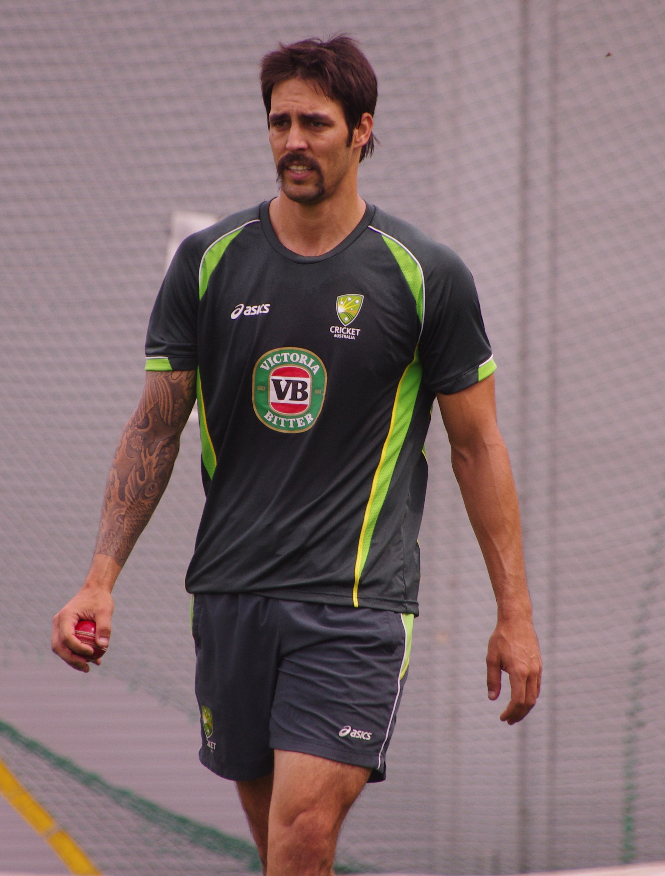 MITCHELL JOHNSON